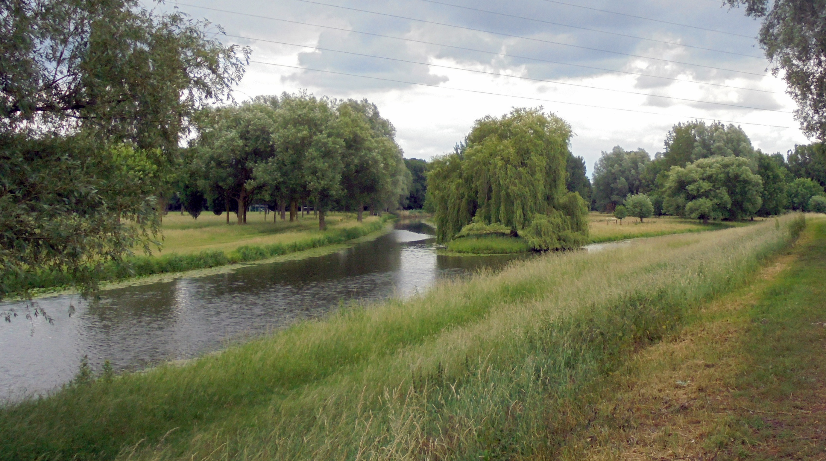 De Vechte nabij Schüttorf - Landkreis Grafschaft Bentheim - Nedersaksen - Duitsland